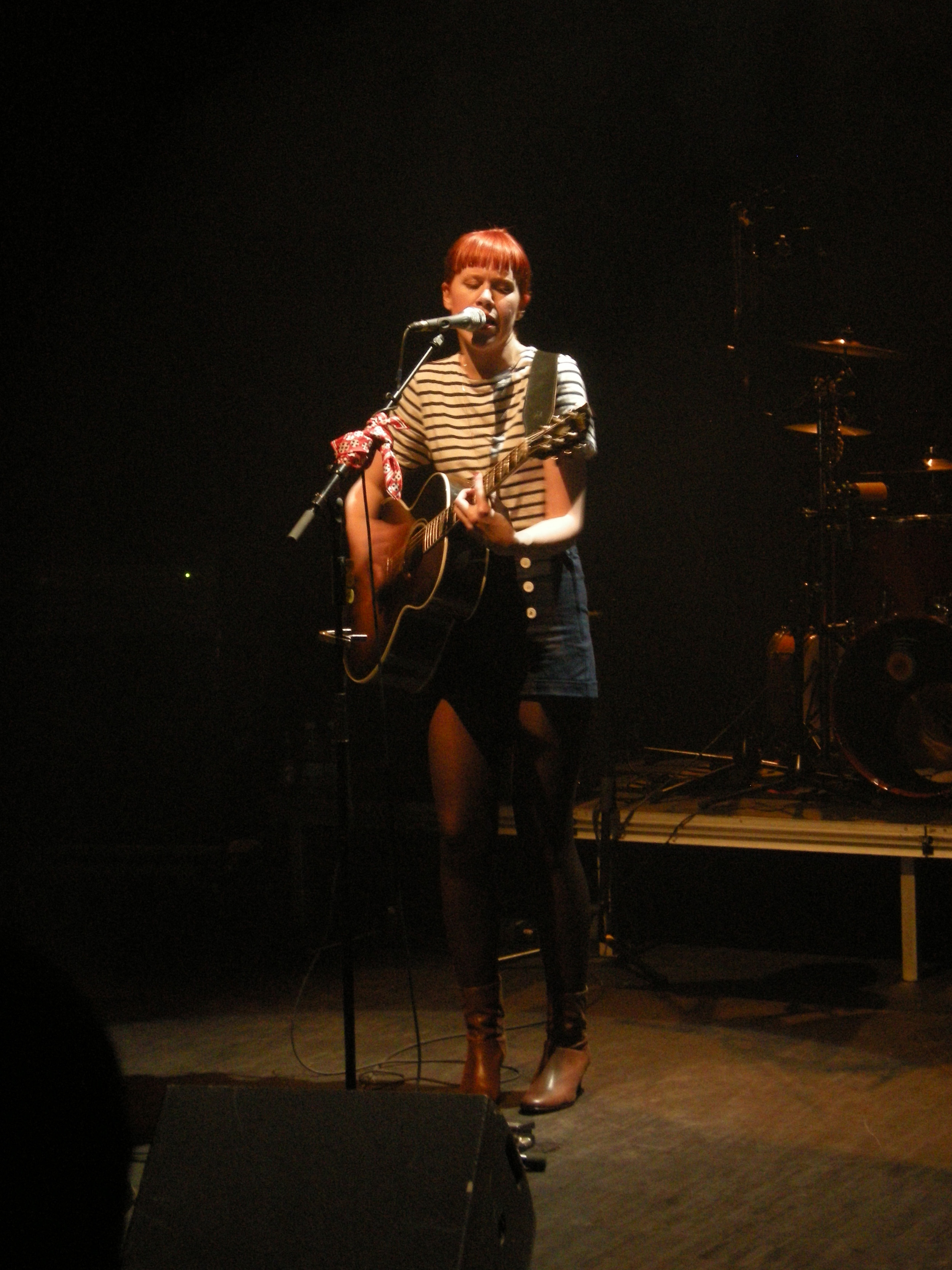 Anna Berthe en concert à Canteleu le 20 novembre 2008